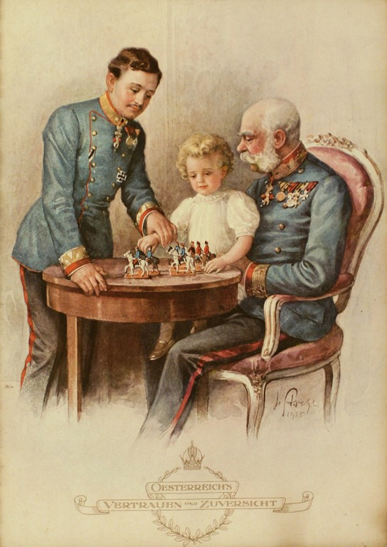 "Österreichs Vertrauen und Zuversicht". Kaiser Franz Joseph, Erzherzog Karl und Erzherzog Otto mit Spielzeugsoldaten, Farblithografie, 1915; Schloß Schönbrunn